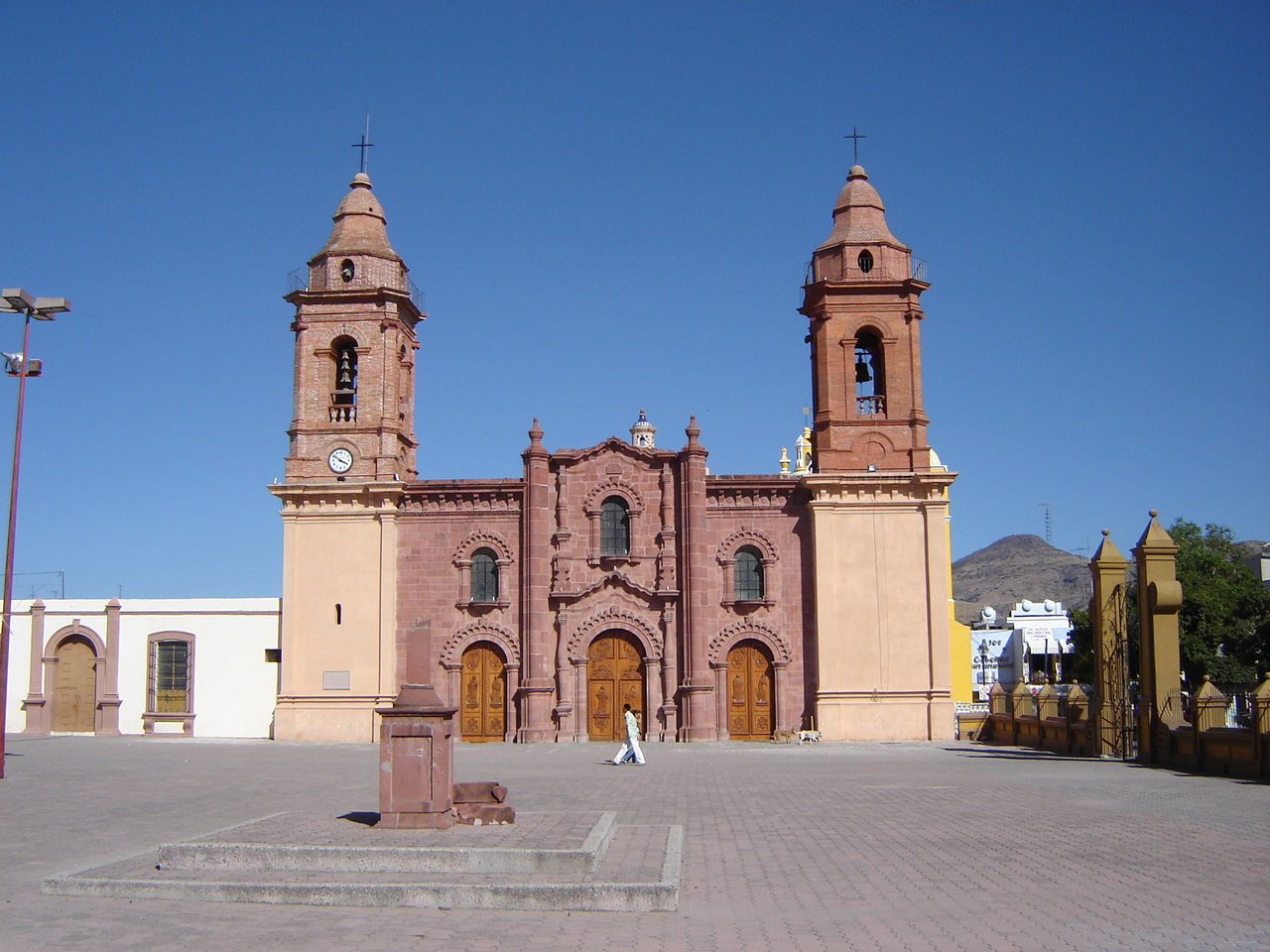 Catedral de San Juan Bautista